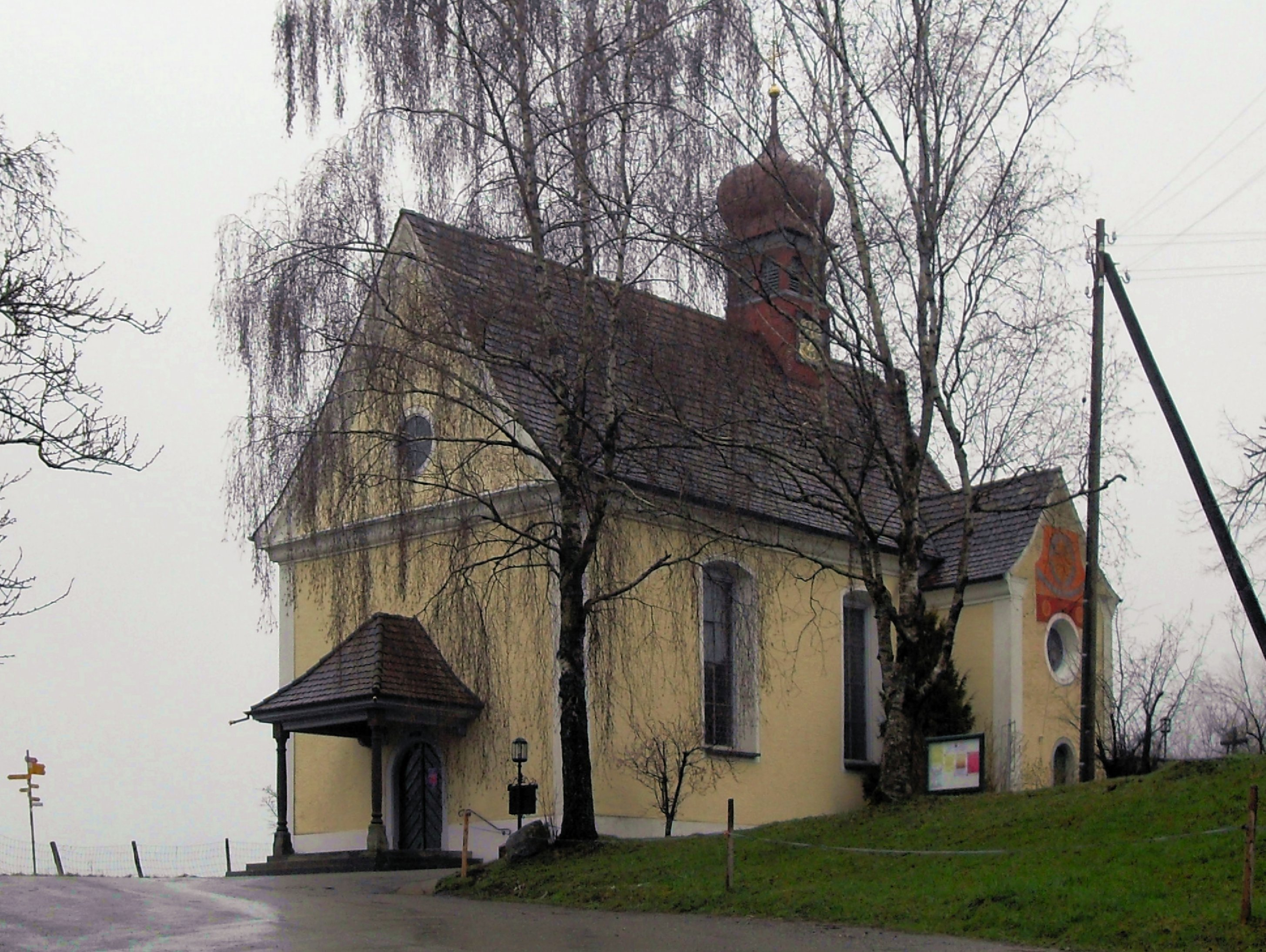 Wallfahrtskirche Mariahilf oder Sieben Schmerzen Mariä Klingenzell, Gemeinde Mammern, Kanton Thurgau, Schweiz